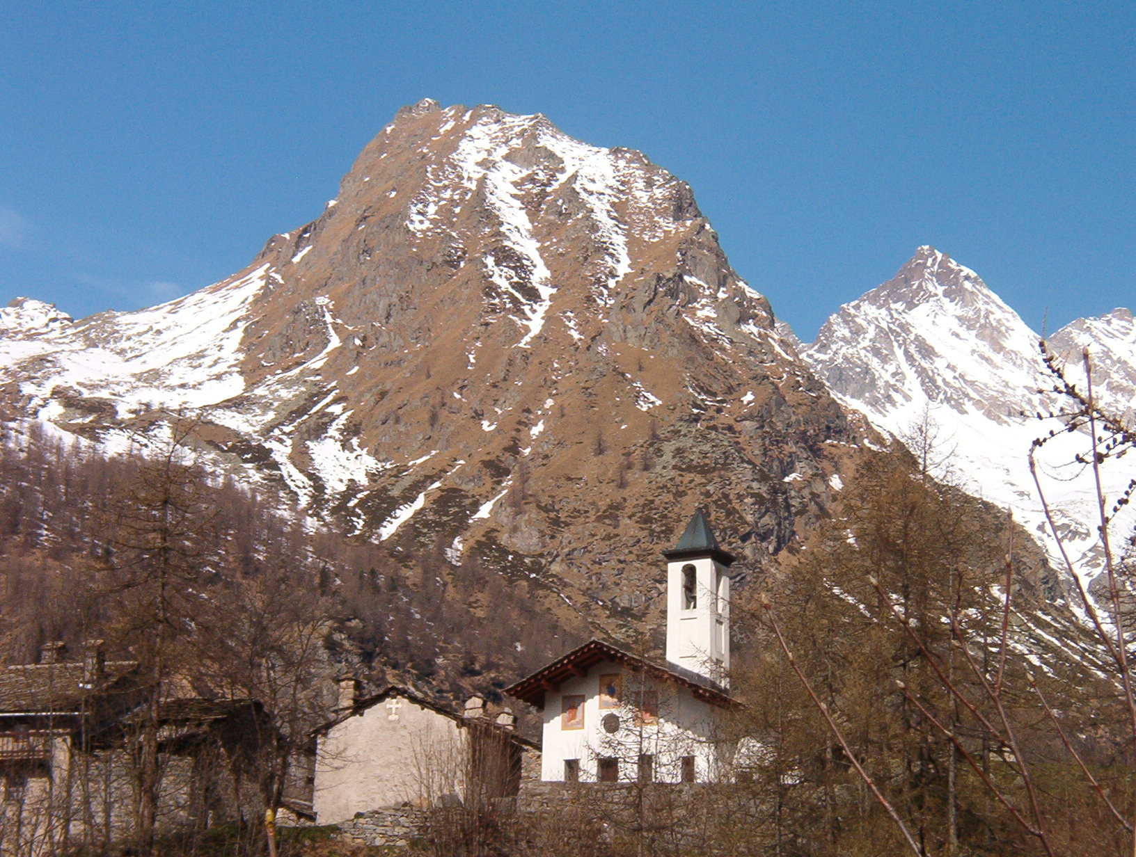 frazione Boschietto - Val Soana - Piemonte - Italia